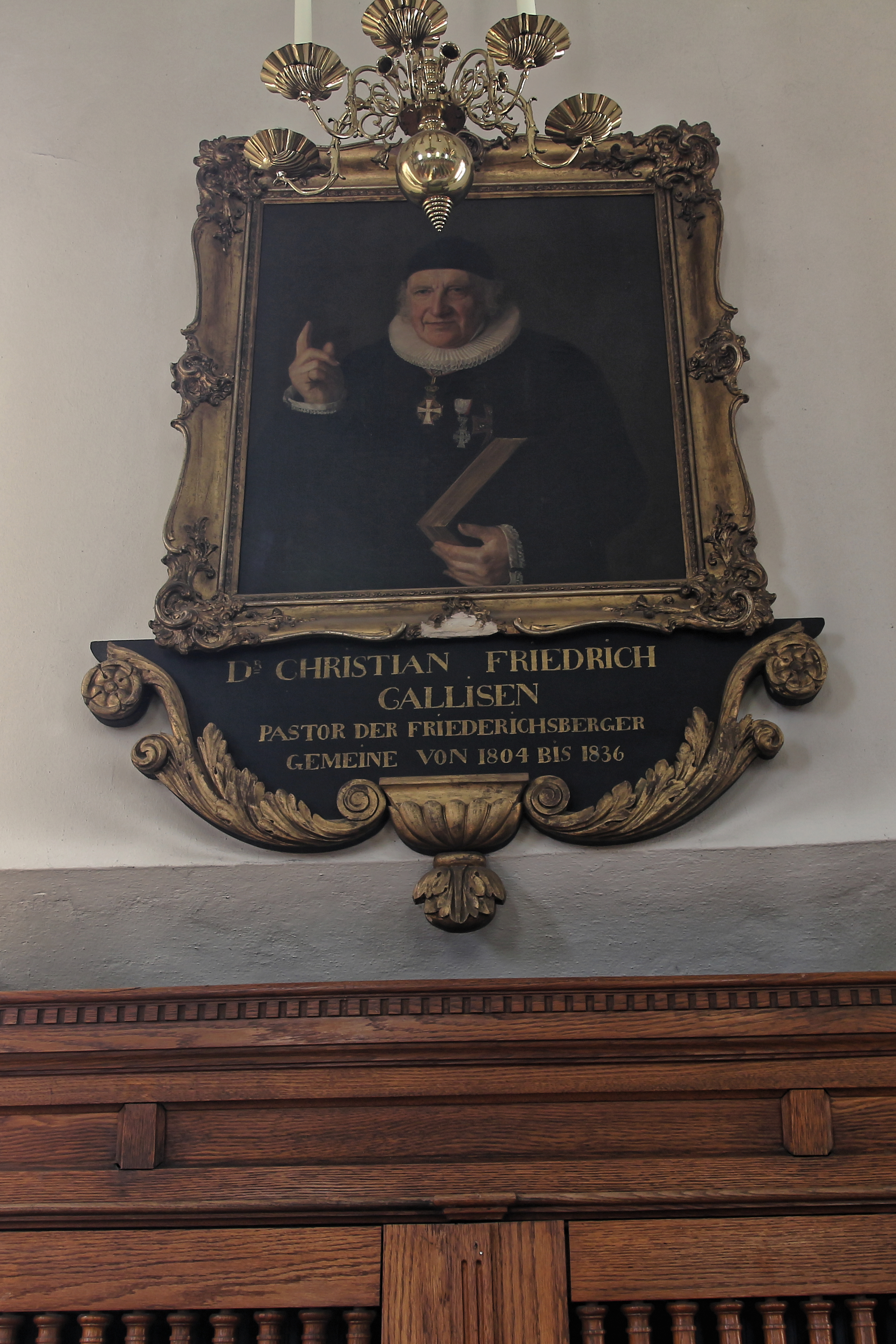 Schleswig Dreifaltigkeitskirche; Pastorenbild